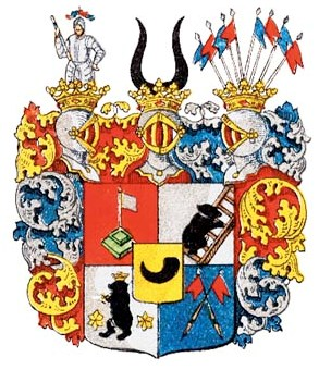 герб графа Горн